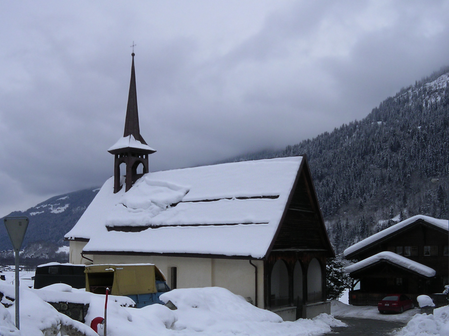 Die Kirche/Kapelle Trun-Principala in Campliun GR, Schweiz, im Winter